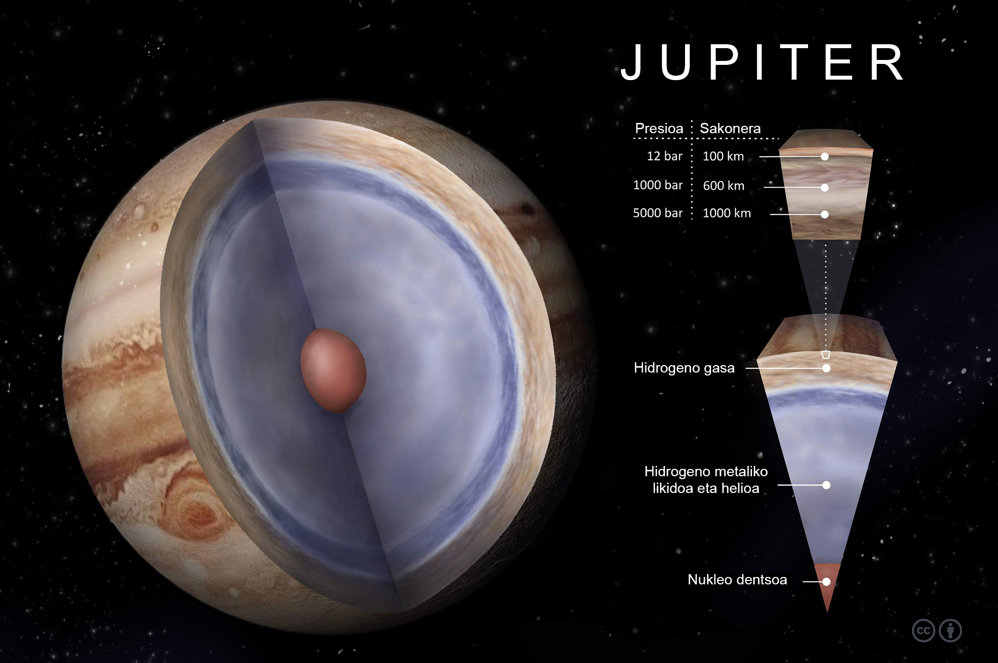 Jupiterren mozketa eta barne egitura kimikoa